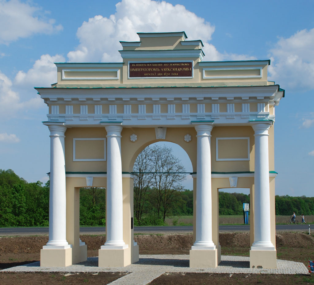 Трiумфальна арка (мур.), Диканька, автотраса Полтава-Гадяч